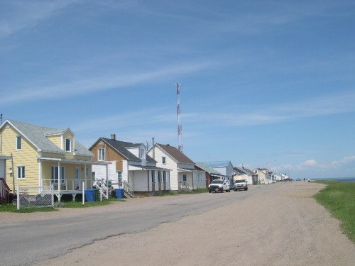 Betsiamites